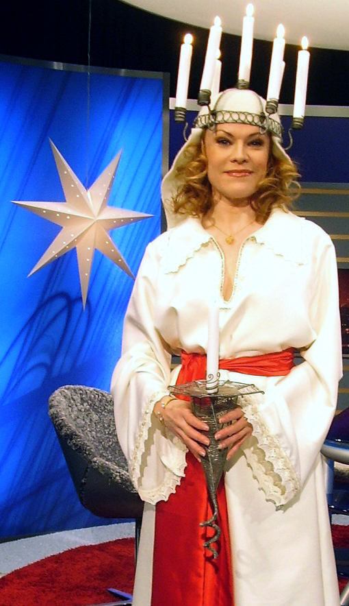 Kishti Tomita som Lucia i TV-programmet Carin 21:trettio 2007